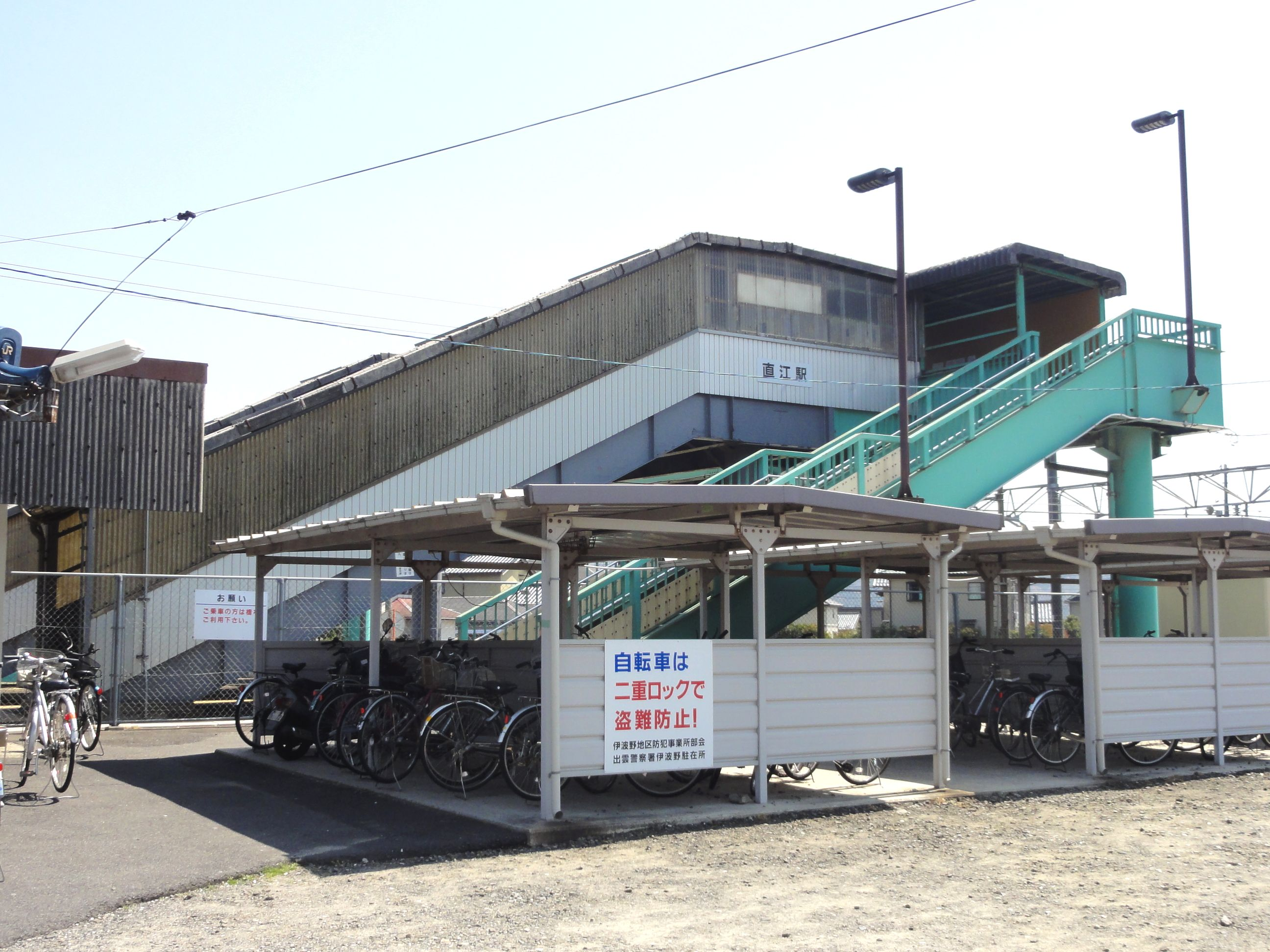 直江駅北口